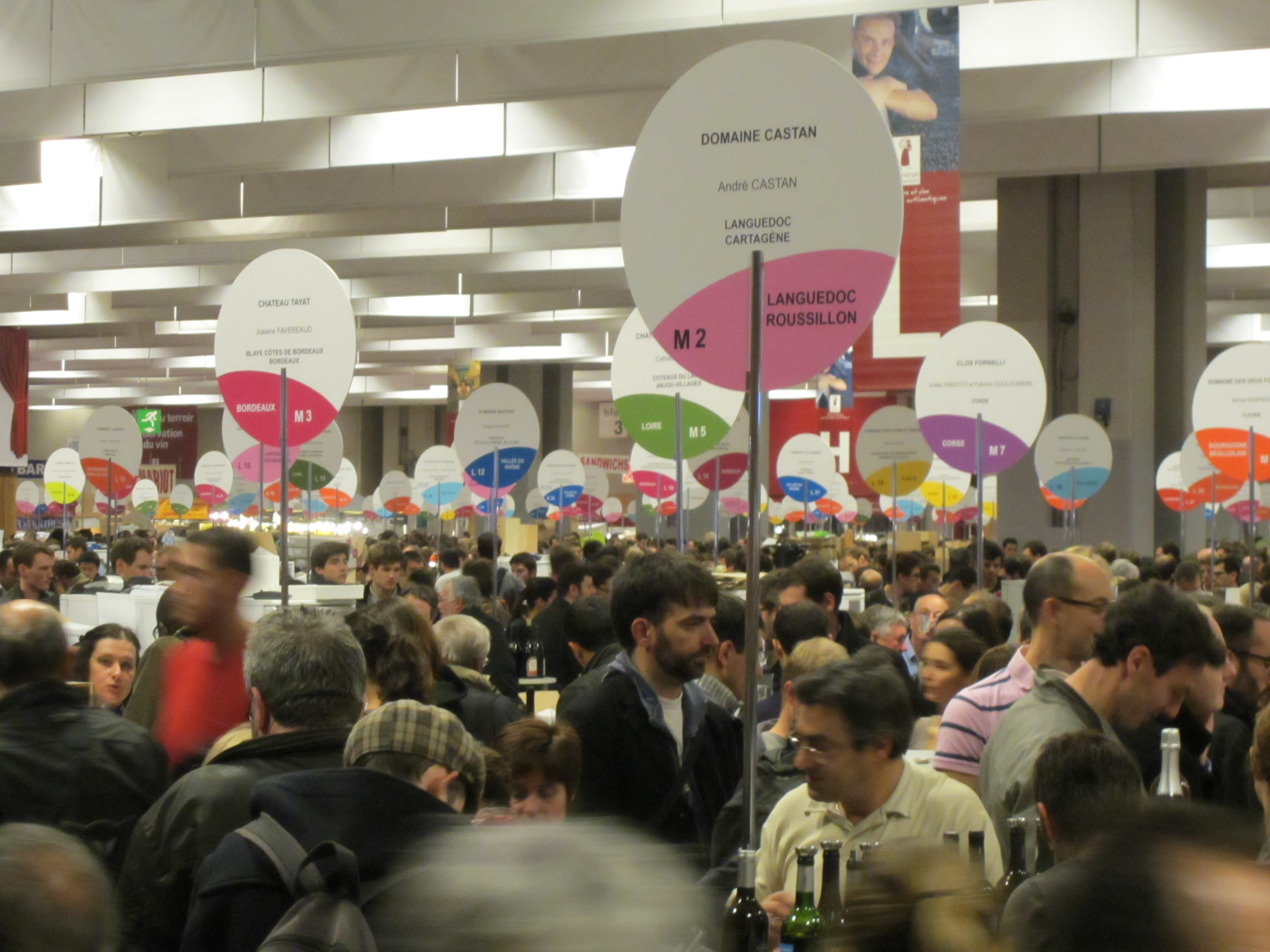 Salon des vignerons indépendants 2013, portes de versailles